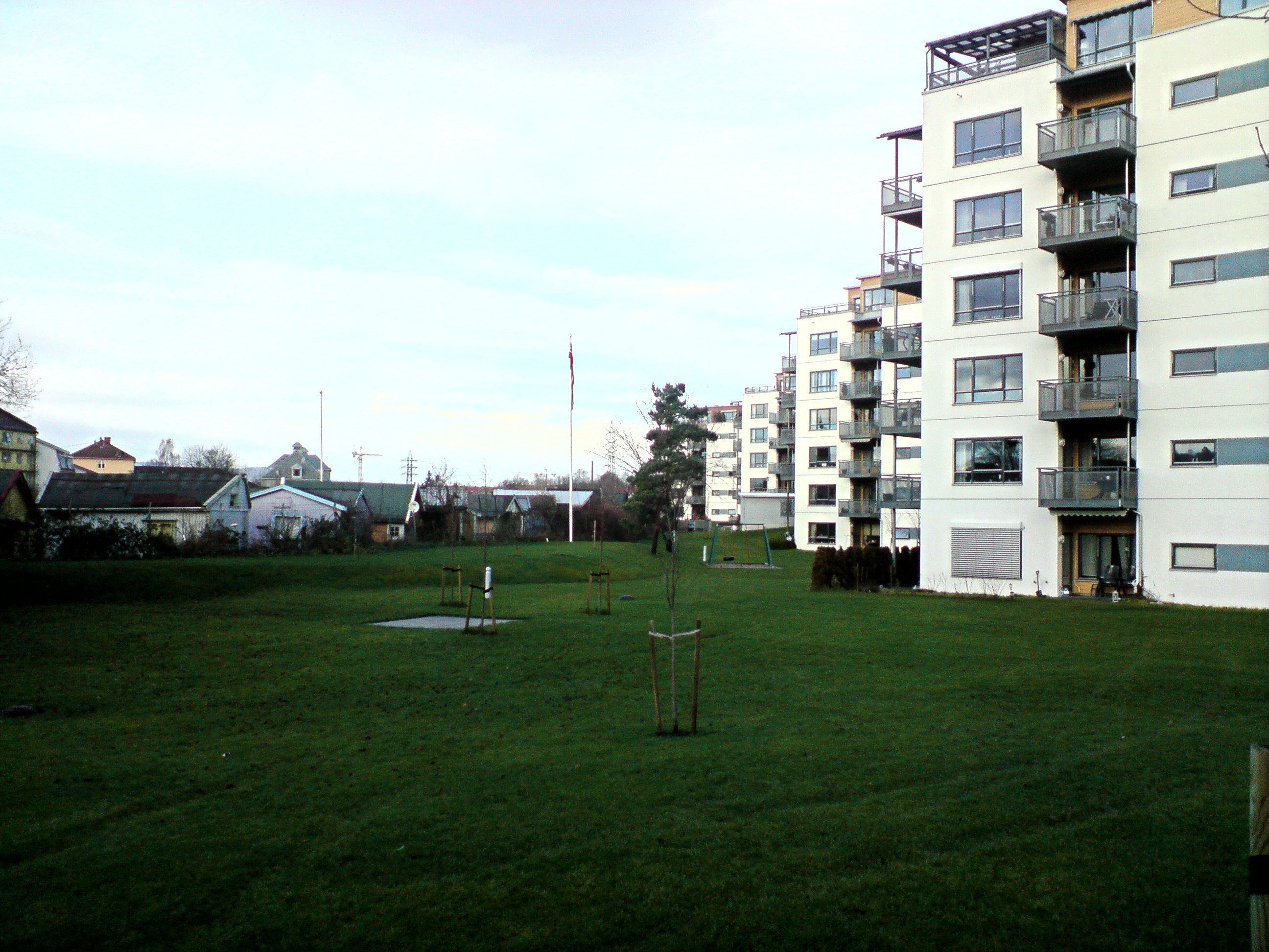 Ny blokkbebyggelse over tidl. jernbaneskjæring. Etterstad kolonihager til venstre